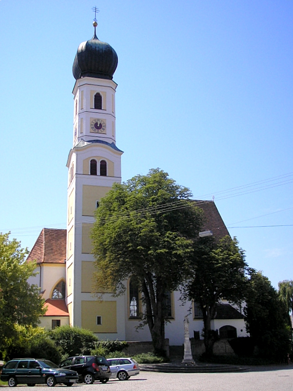 Pfarrkirche St. Anna (Waal bei Landsberg am Lech, Landkreis Ostallgäu, Bayerisch-Schwaben). Gesamtansicht. Eigene Aufnahme, Juli 2007 / Parish church St. Anne (Waal near Landsberg am Lech, Bavaria, Germany). Total view. Own photo, July 2007